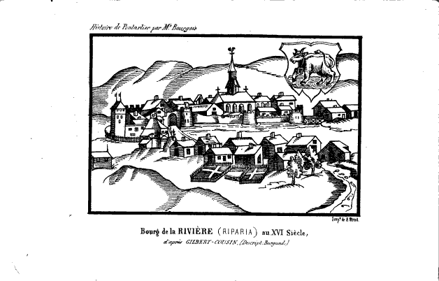 Bourg de La Rivière au XVIéme siècle